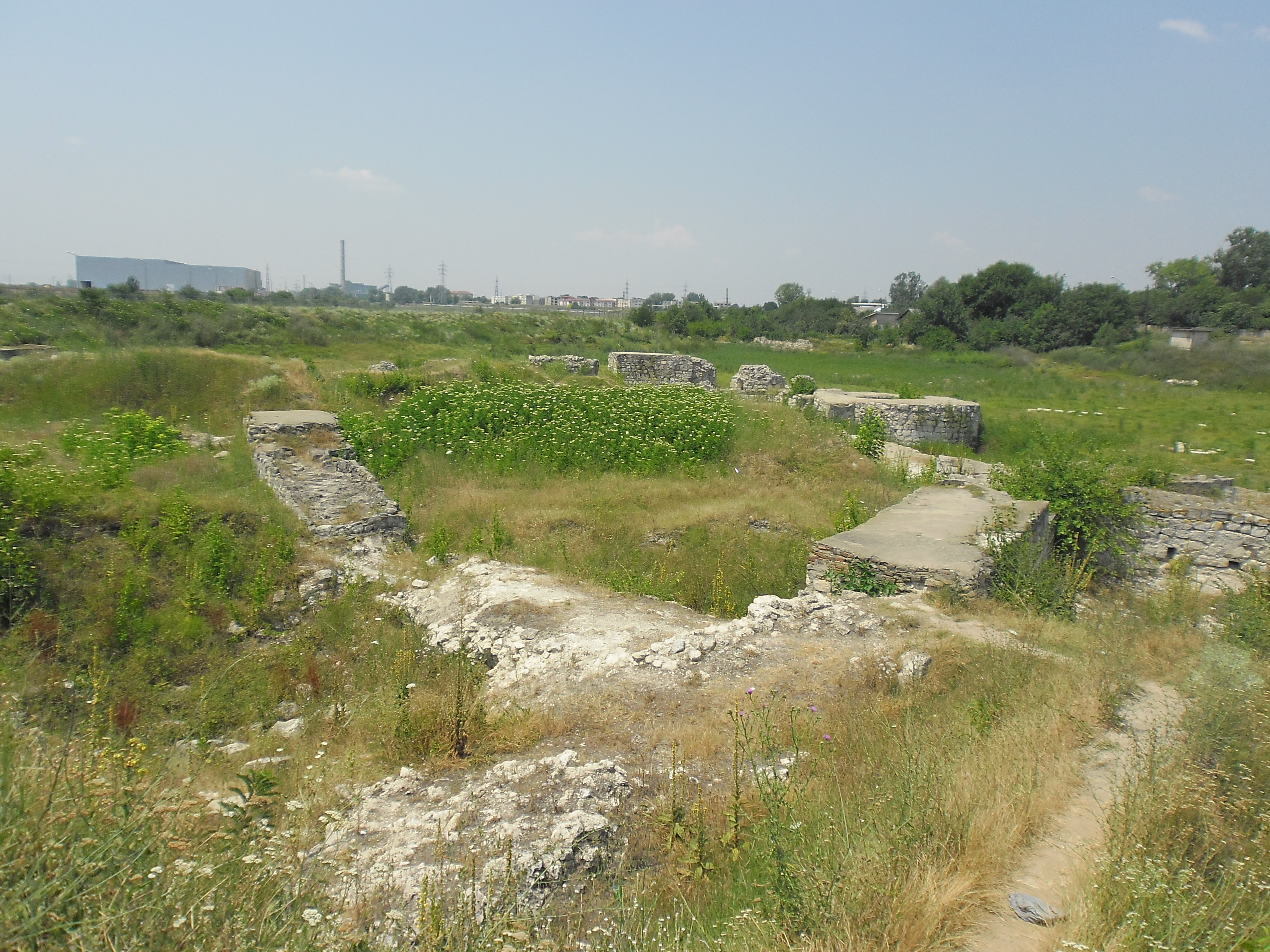 Cetatea Giurgiu